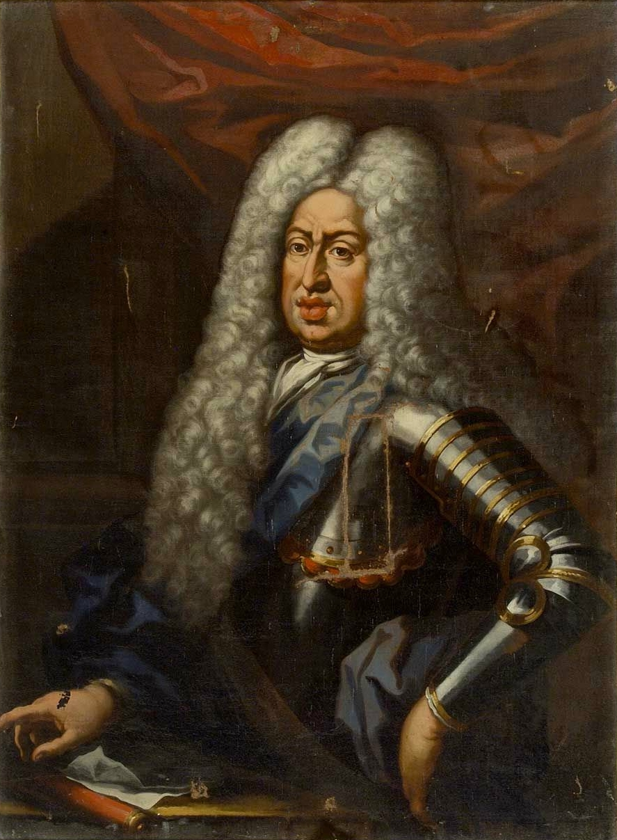 Gian Gastone de' Medici, granduca di Toscana dal 1723 al 1737. Copia da un ritratto di Ferdinando Richter.